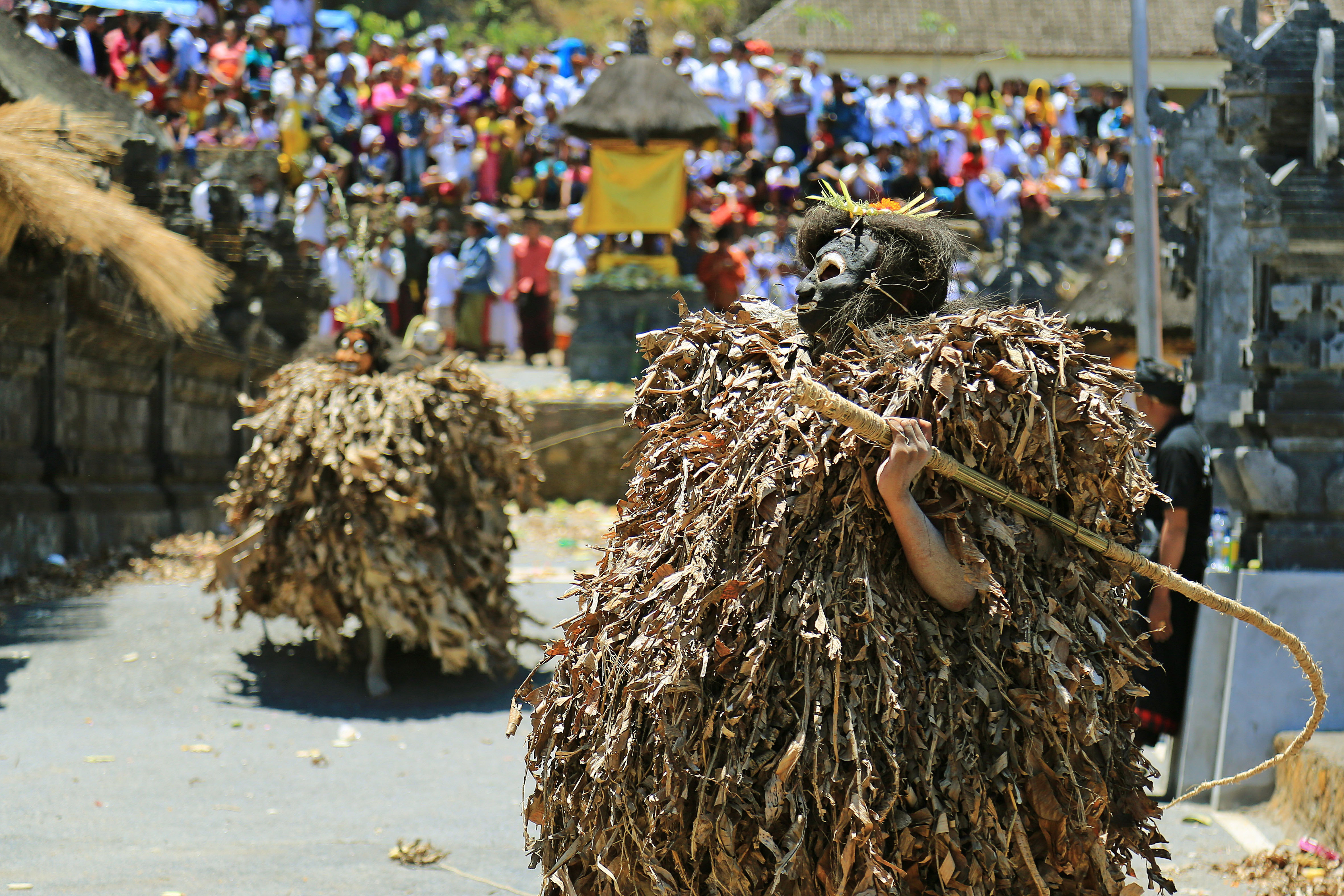 Tari Barong Brutuk merupakan tarian klasik khas wilayah Desa Trunyan kecamatan Kintamani Bangli Bali. Tarian ini ditarikan oleh remaja putra dengan mengenakan pakean yang terbuat dari kraras atau daun pisang yang sudah kering. sebelum menarikan tarian sakral ini para remaja melaksanakan prosesi penyucian diri berupa mandi di danau serta beberapa prosesi sakral lainnya. selama pementasan tarian Barong Brutuk ini, para penari berkeliling area Pura Puserin Jagat di Desa Trunyan dengan membawa pecut/cemeti dan menghempaskan cemeti tersebut kepada para penonton di sekitar Pura. masyarakat setempat meyakini apabila terkena hempasan cemeti tersebut mereka mendapat berkah/obat atau disebut "tamba" serta mampu memberi perlindungan diri dar gangguan magis.